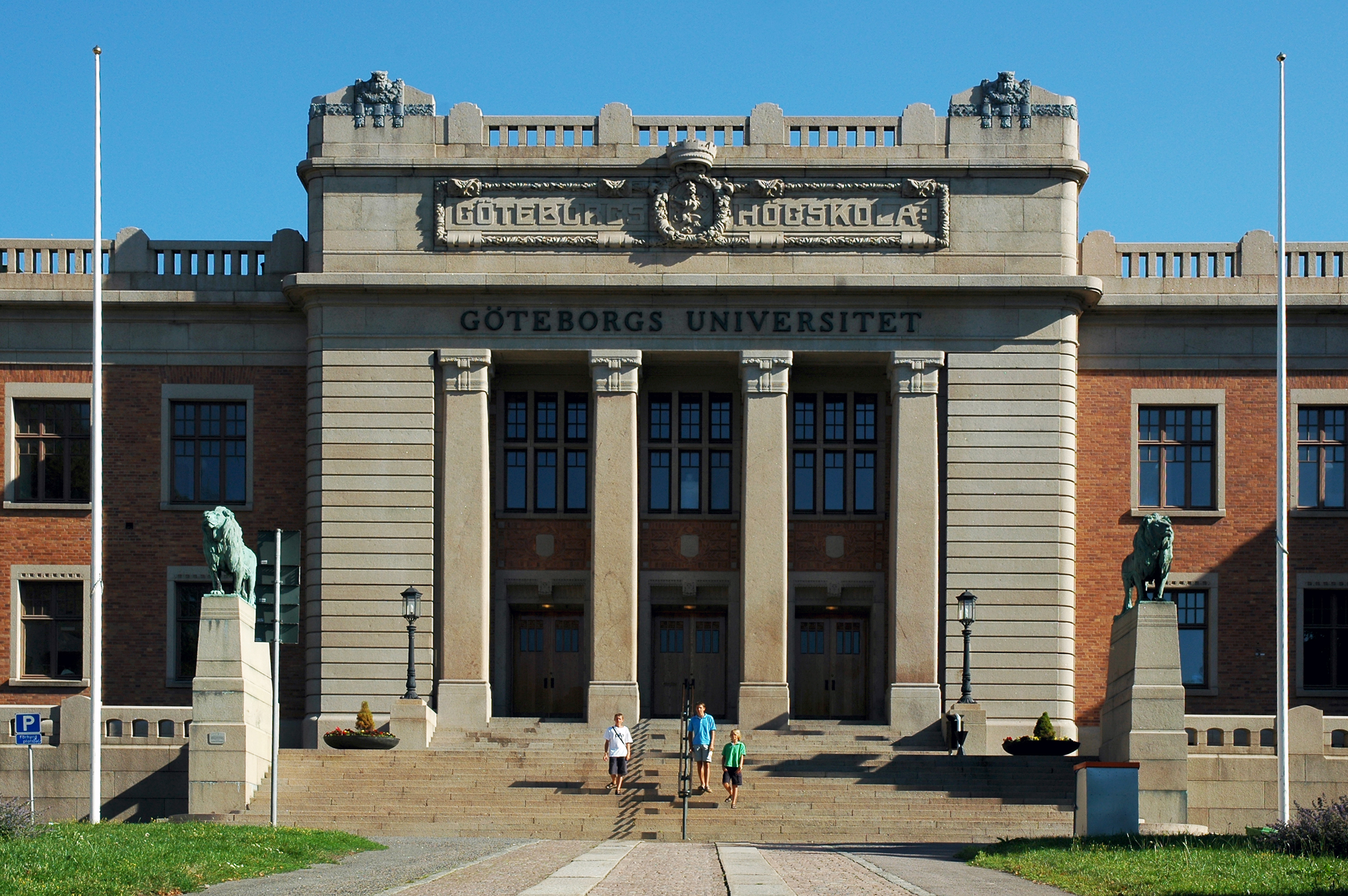 De Universiteit van Göteborg, Zweden; (en) The University of Göteborg, Sweden